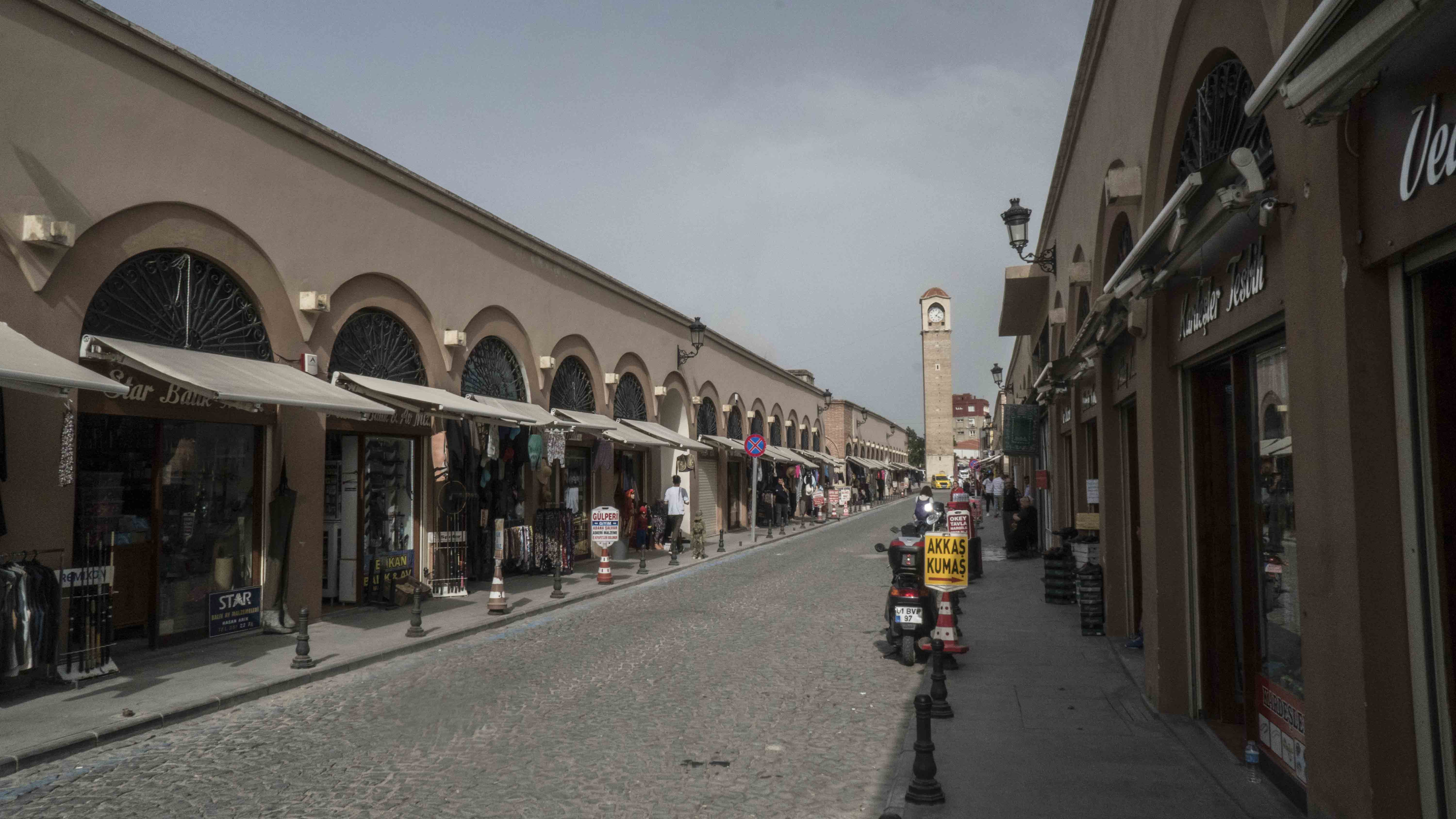 Adana old market and Büyük Saat clocktower, Ali Münif Yeğenağa Cd Object location36° 59′ 01.91″ N, 35° 19′ 42.82″ E